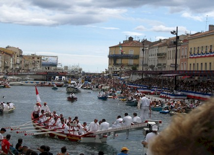 photo perso des joutes nautiques de la fête de la saint-Louis 2006 à Sète